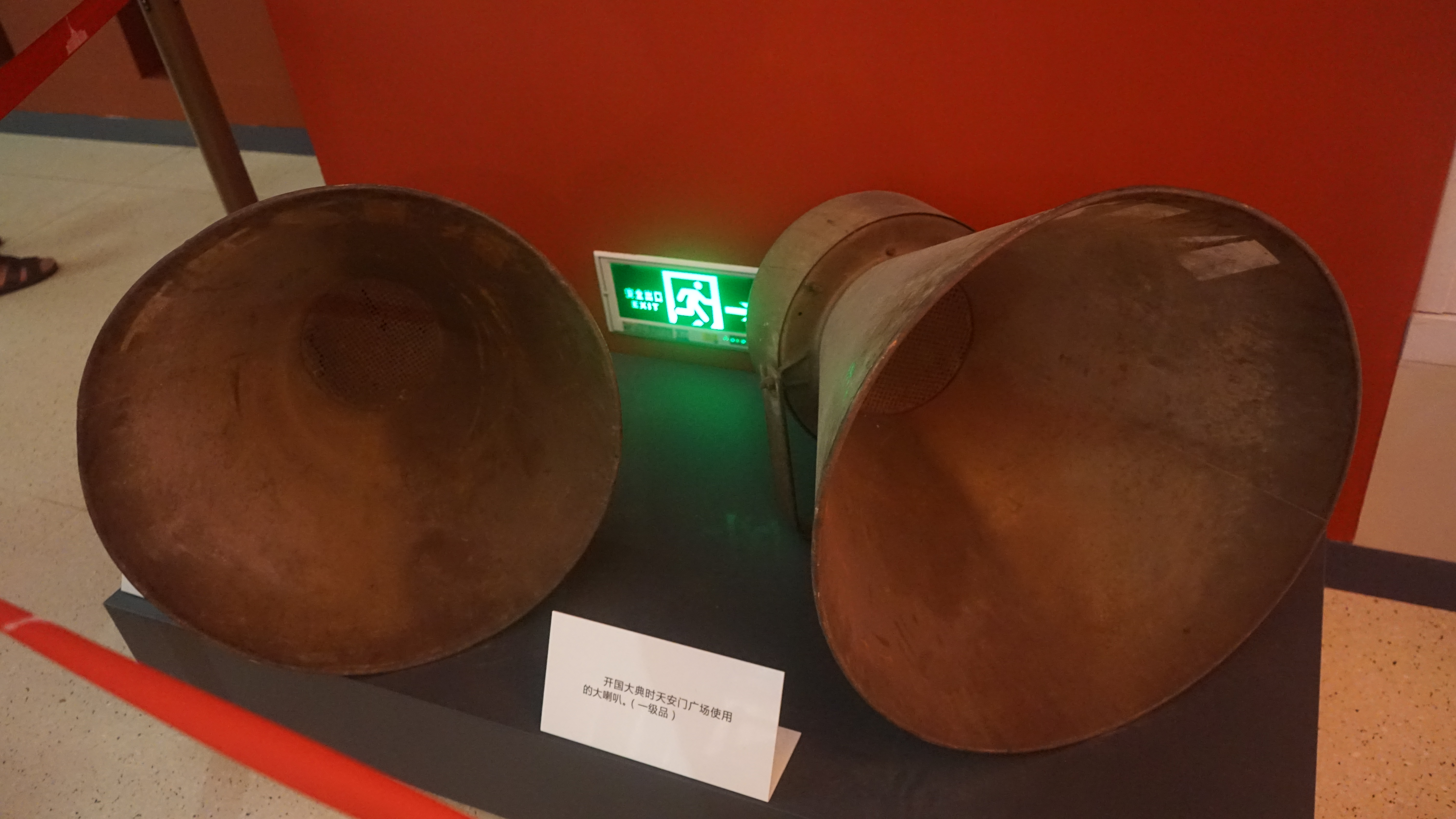 中文（中国大陆）: 开国大典时天安门城楼上使用的喇叭。一级文物。